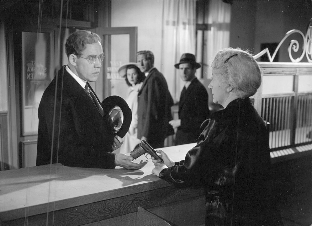 Holger Löwenadler och Hjördis Petterson i filmen "Resan bort". 4/45-9.